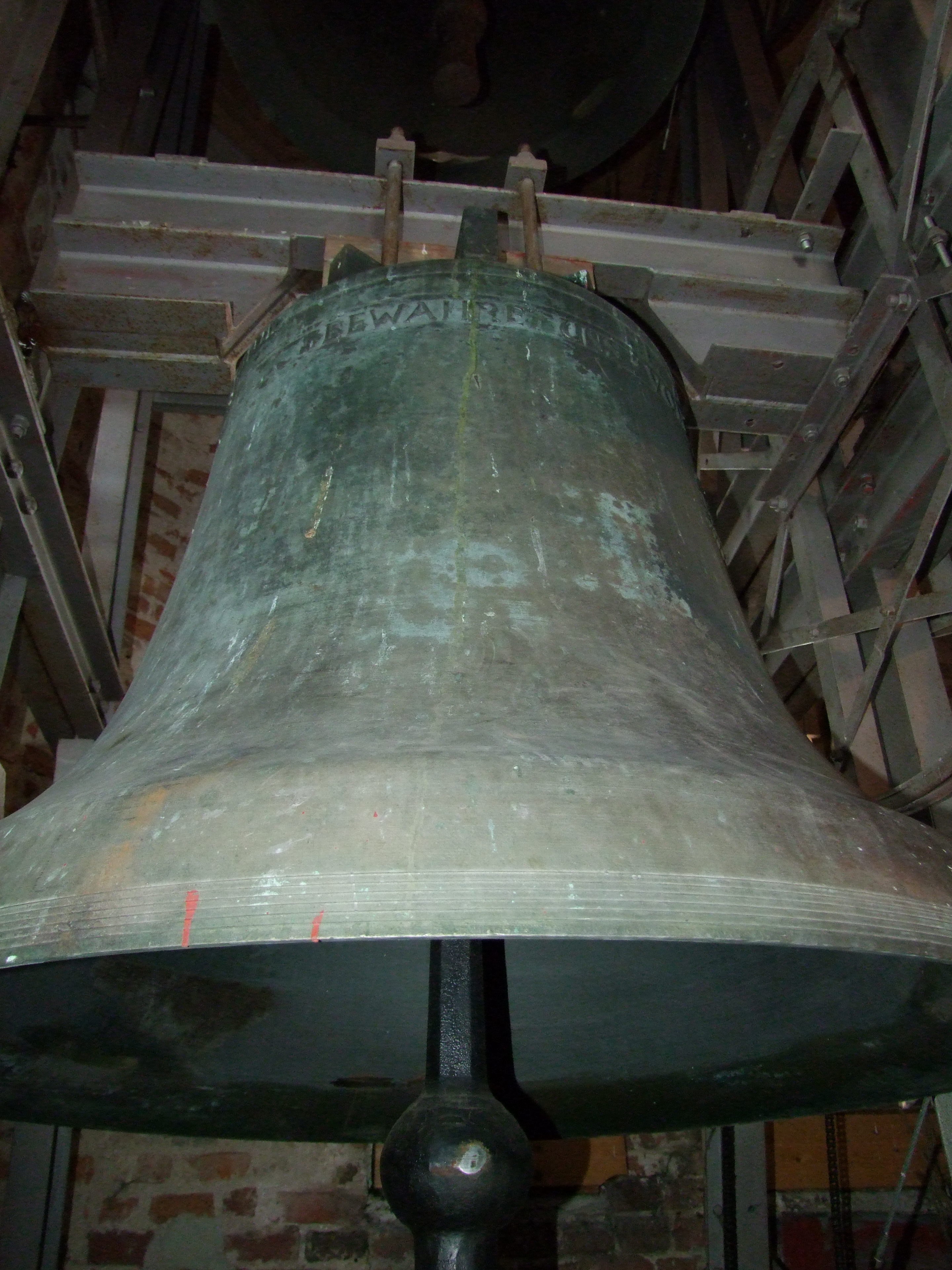 St. Magnus in Unterrammingen in Oberschwaben